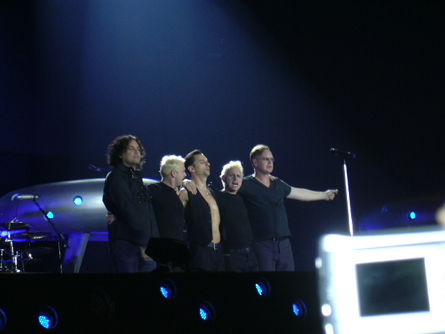 Depeche Mode en concert (Barcelona, 11 de febrer de 2006), realitzada per Catsynth